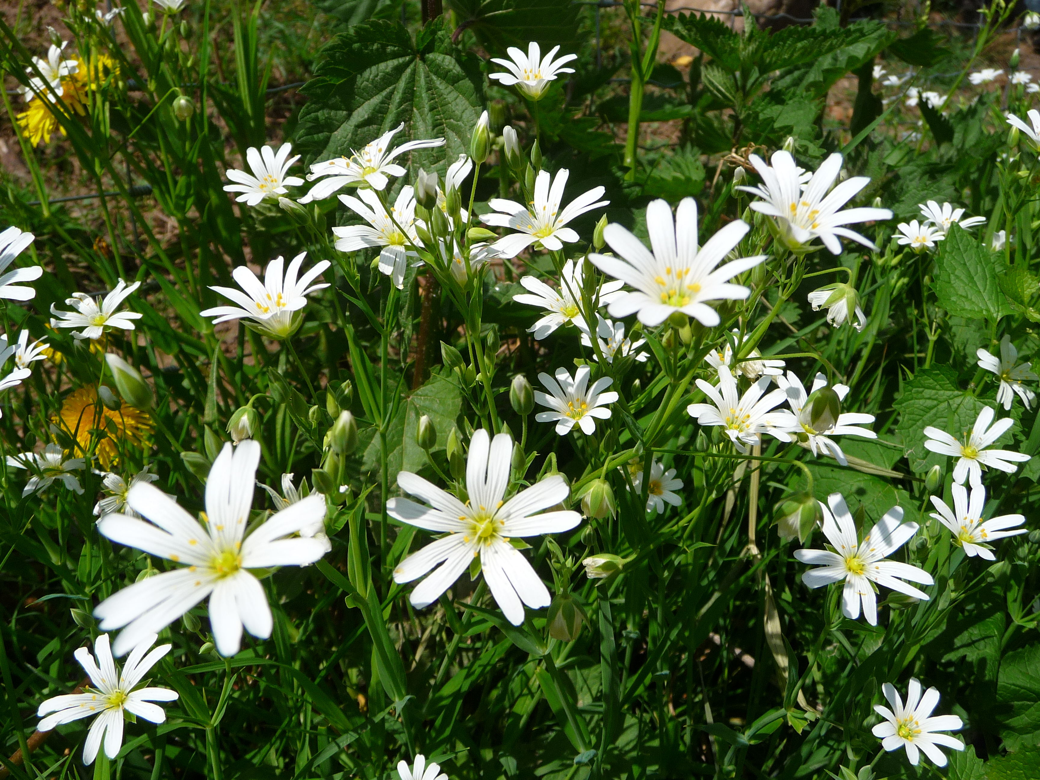 Große Sternmiere (Stellaria holostea) aus der Familie der Nelkengewächse (Caryophyllaceae), fotografiert in Heidelberg (Baden-Württemberg, Deutschland)